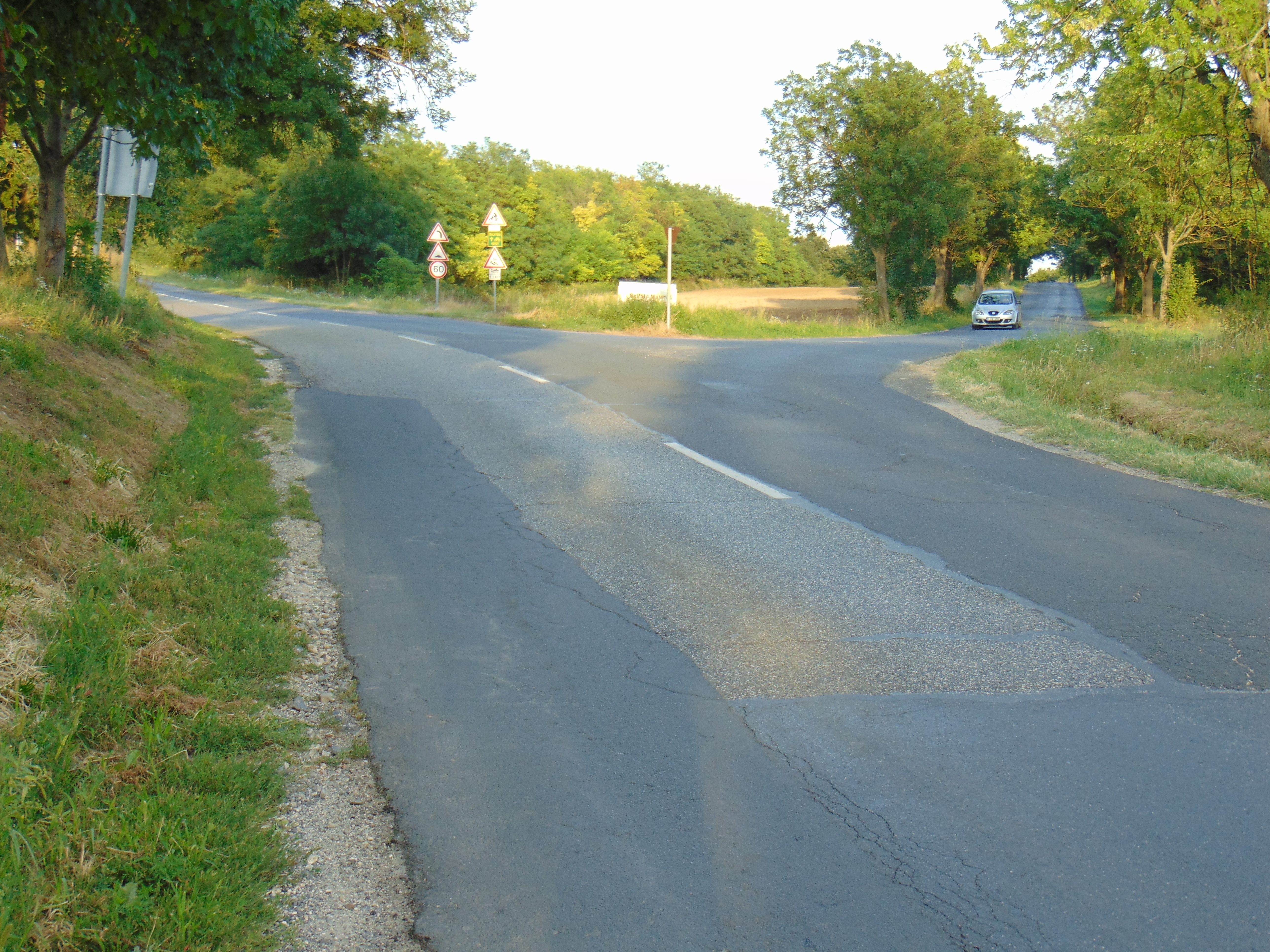 A 7313-as út a jobb felől érkező 7346-os betorkollásánál Káptalantóti keleti határában